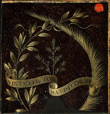 Rückseite des Gemäldes Ginevra de' Benci von Leonardo da Vinci